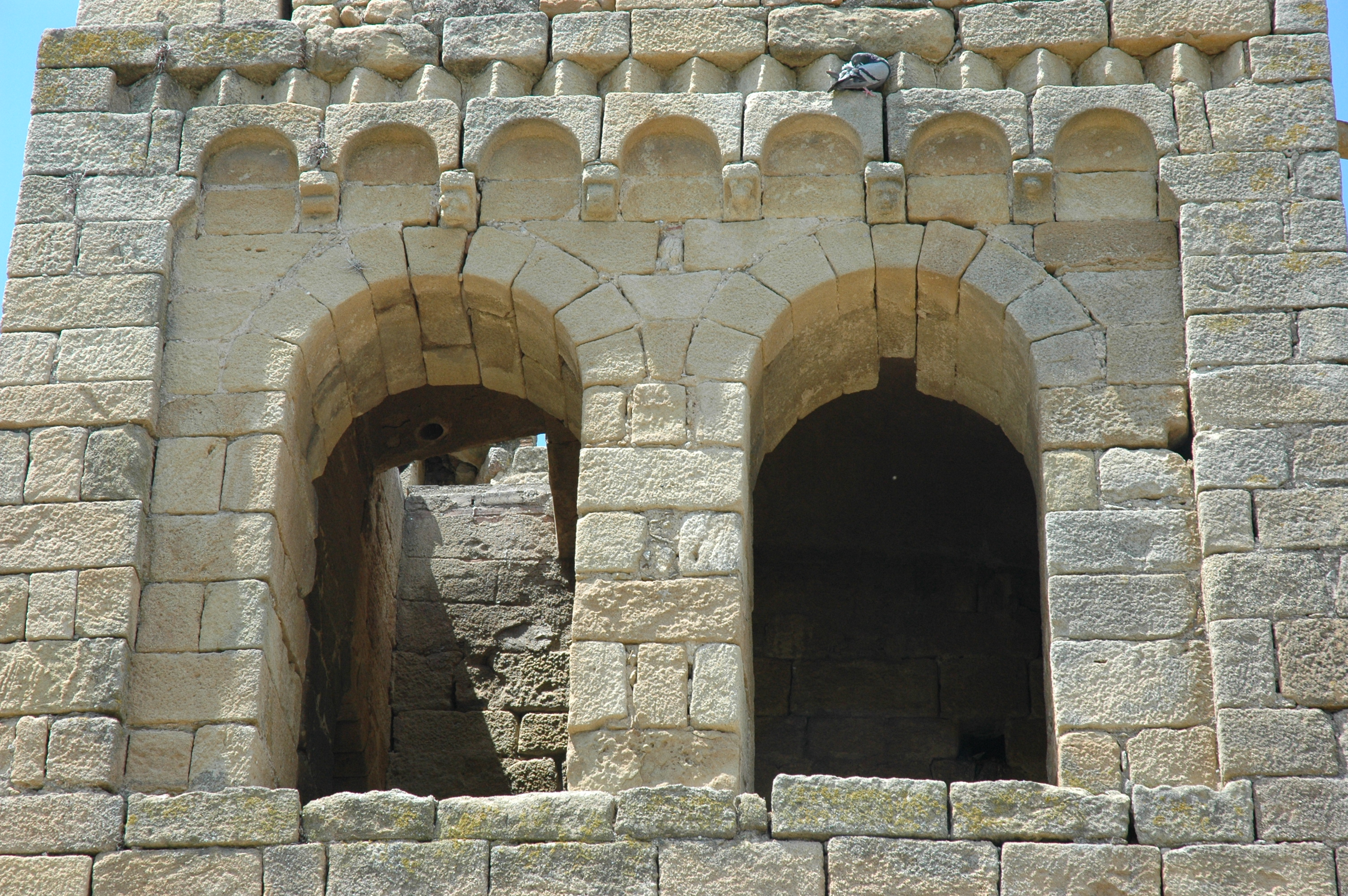 Sant Esteve de Canapost